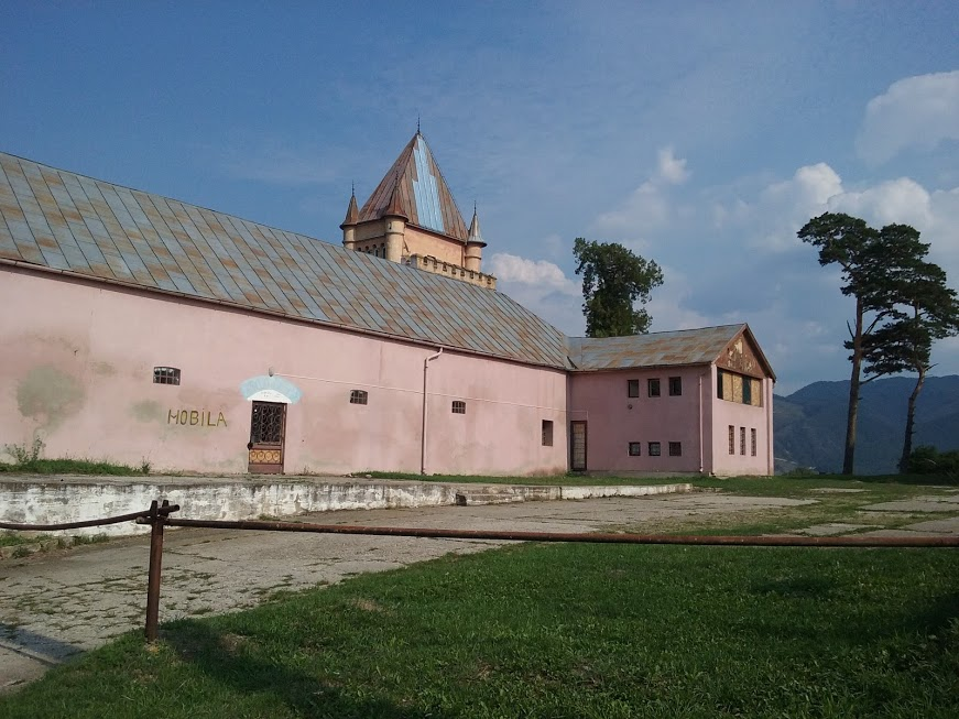 Anexe sat Sântămăria-Orlea; comuna Sântămăria-Orlea sf. sec. XVIII-înc. sec. XIX 02